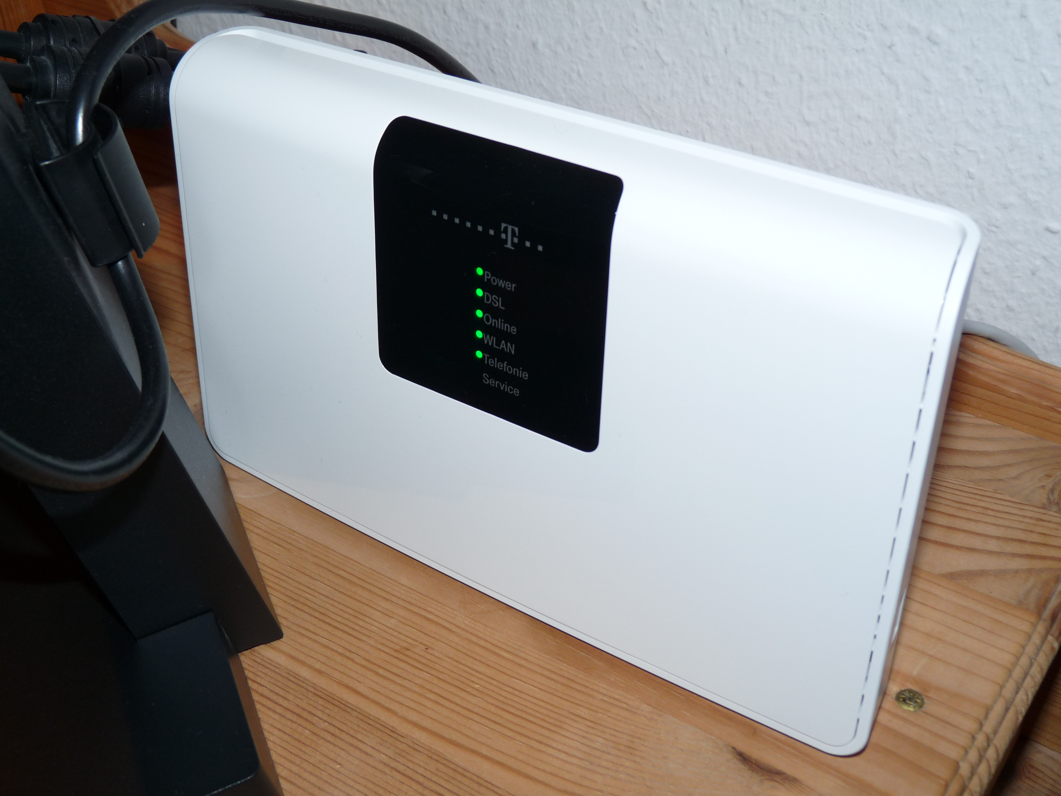 Speedport W723V Typ A von Huawei (Generation 2011)